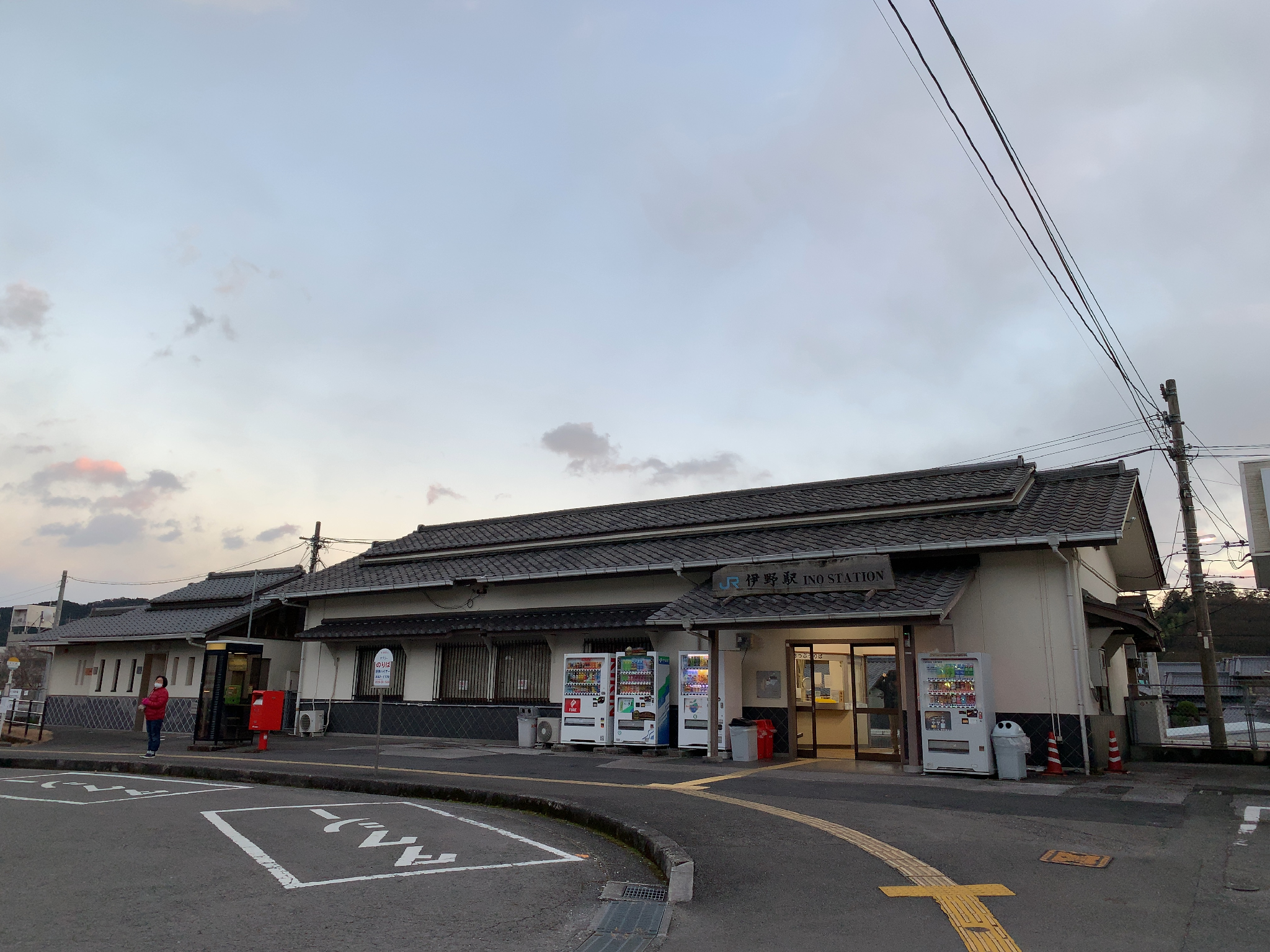 JR伊野駅 駅舎